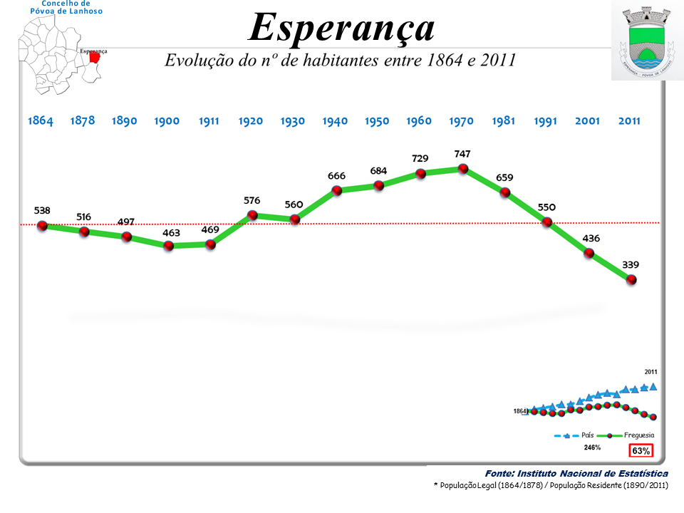 Censos 1864/2011